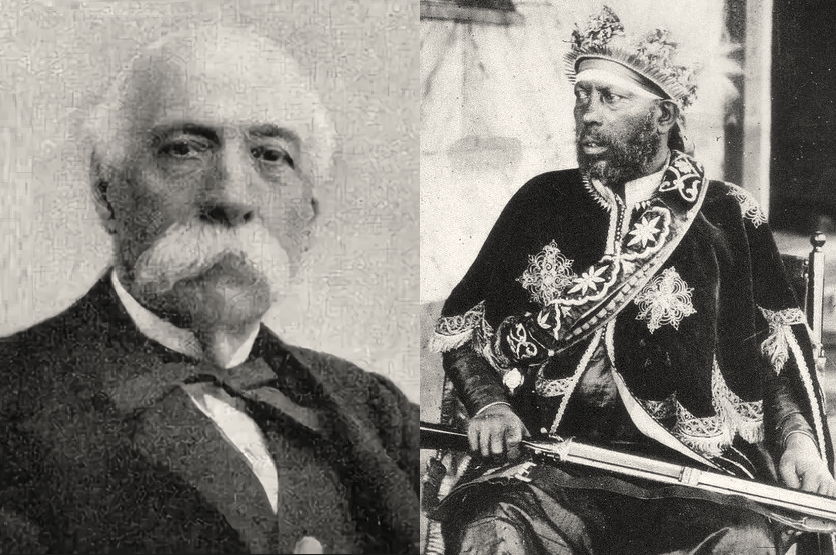 Премьер-министр Италии Франческо Криспи и император Эфиопии Менелик II, 1889 год